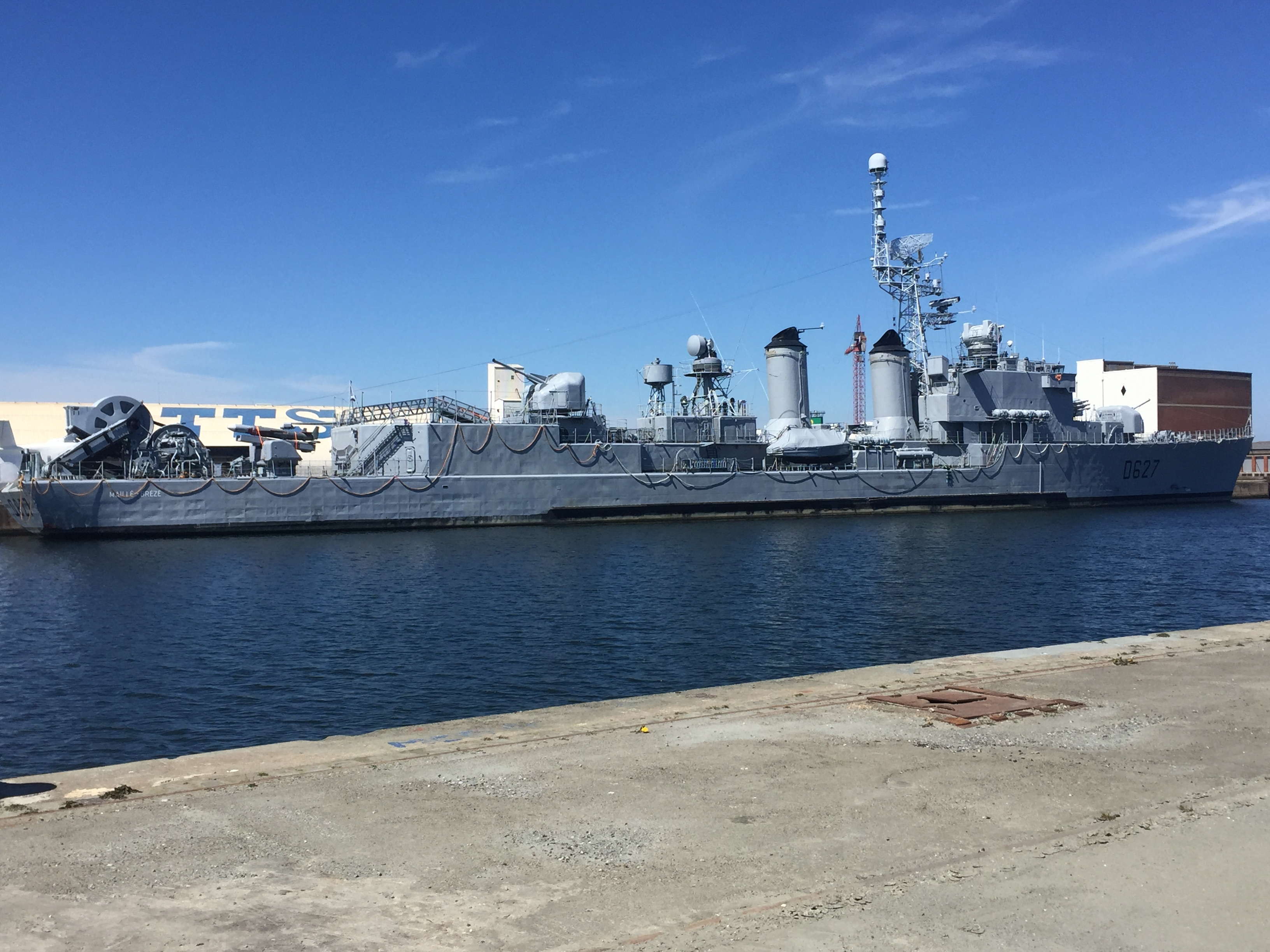 Le Maillé-Brezé dans le port Est de Dunkerque, à son arrivée le 1er mai, afin de servir de décor pour le film "Dunkirk" de Christopher Nolan.